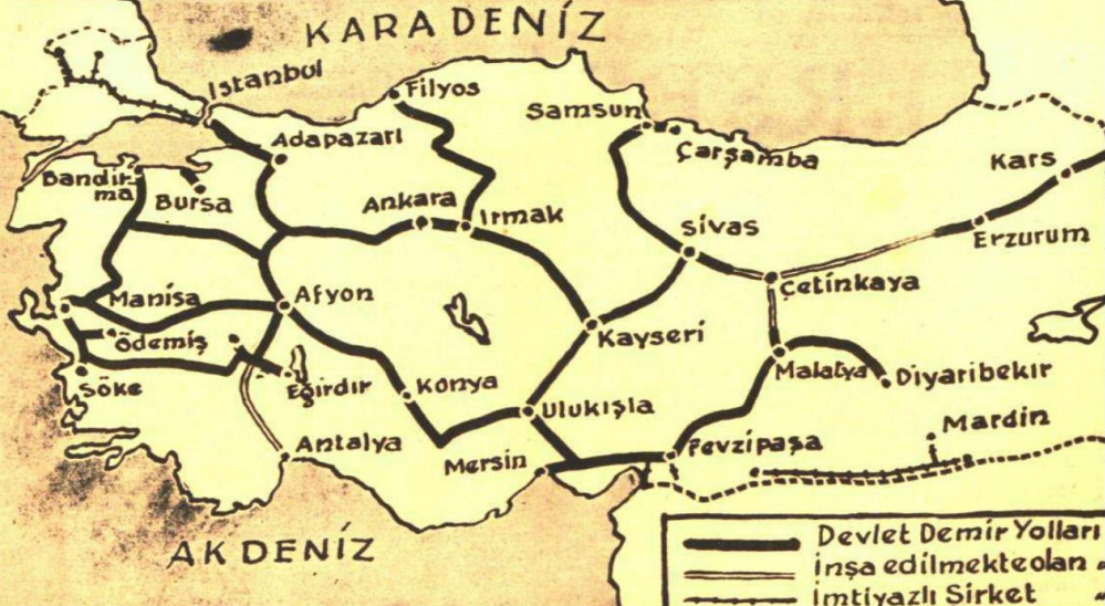 Türkiye'deki demiryollarının 1936 yılına ait harita.